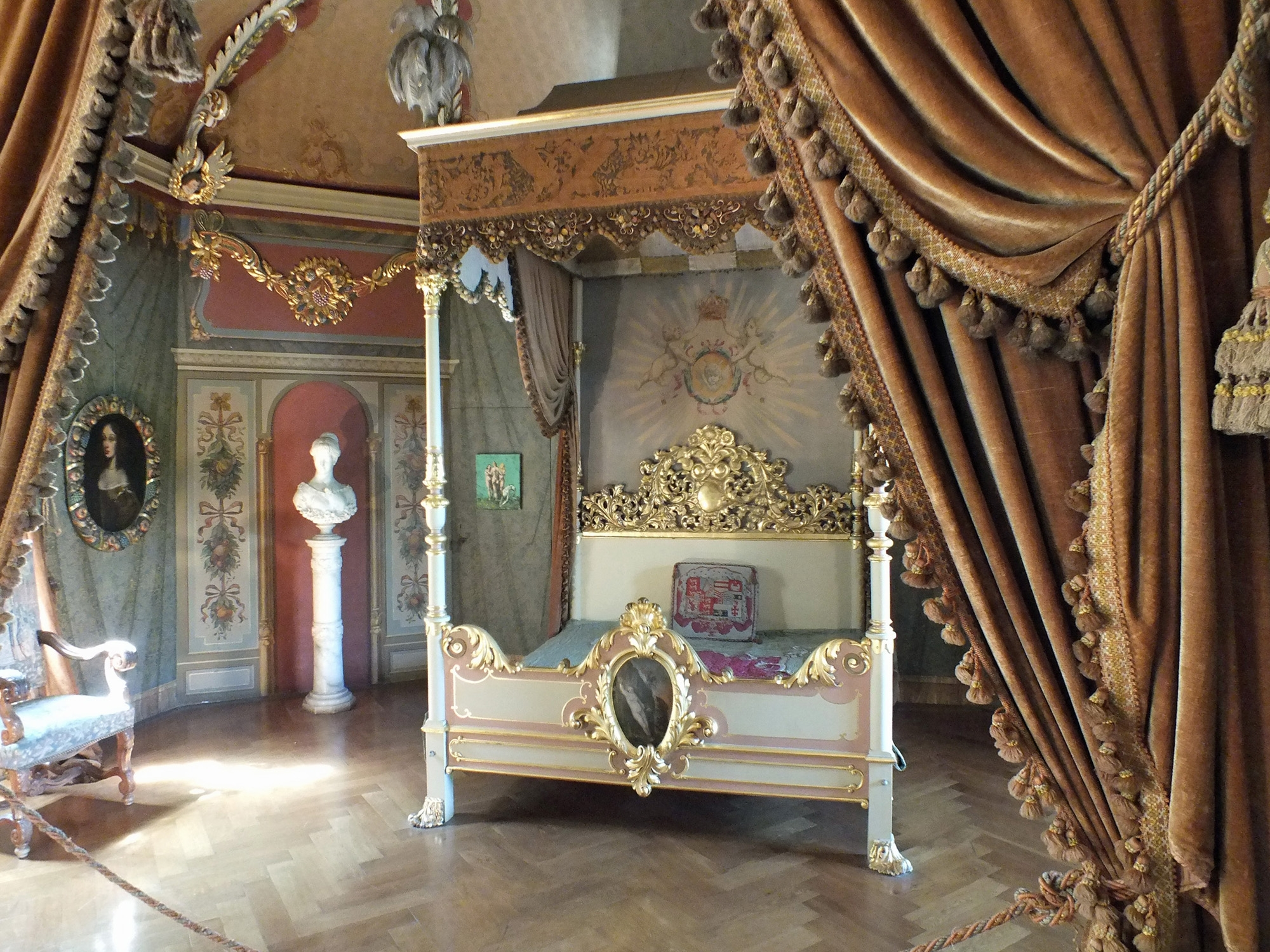 Bettalkoven im Prunkzimmer des Schlosses Burgk